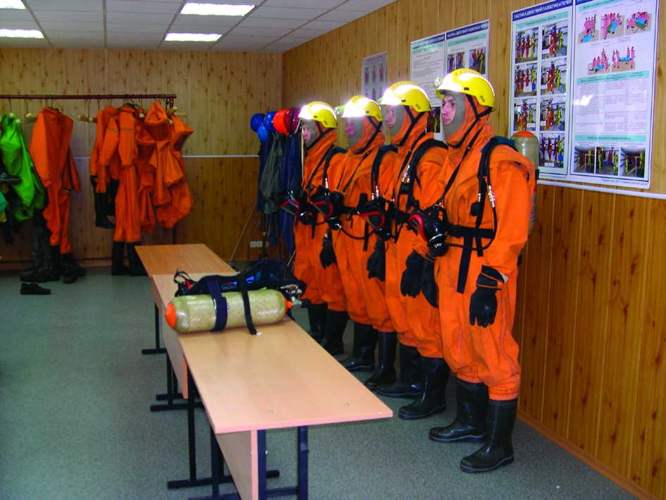 Кафедра ГССиФ